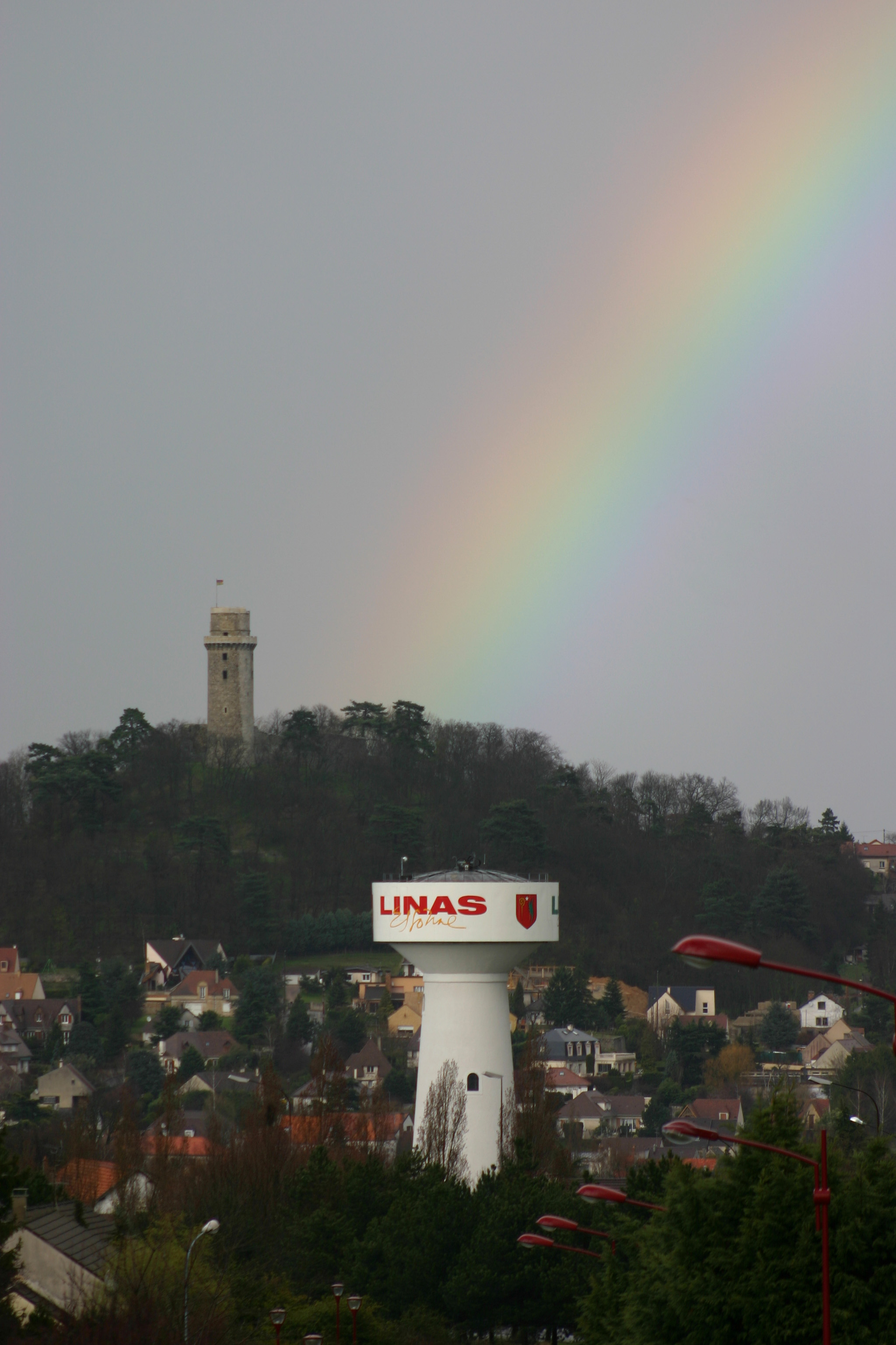 Linas, Essonne. Vue du château d'eau de Linas avec, en fond, la tour de Montlhéry. ©éréales Kille® [mailto:cerkil(at)free.fr